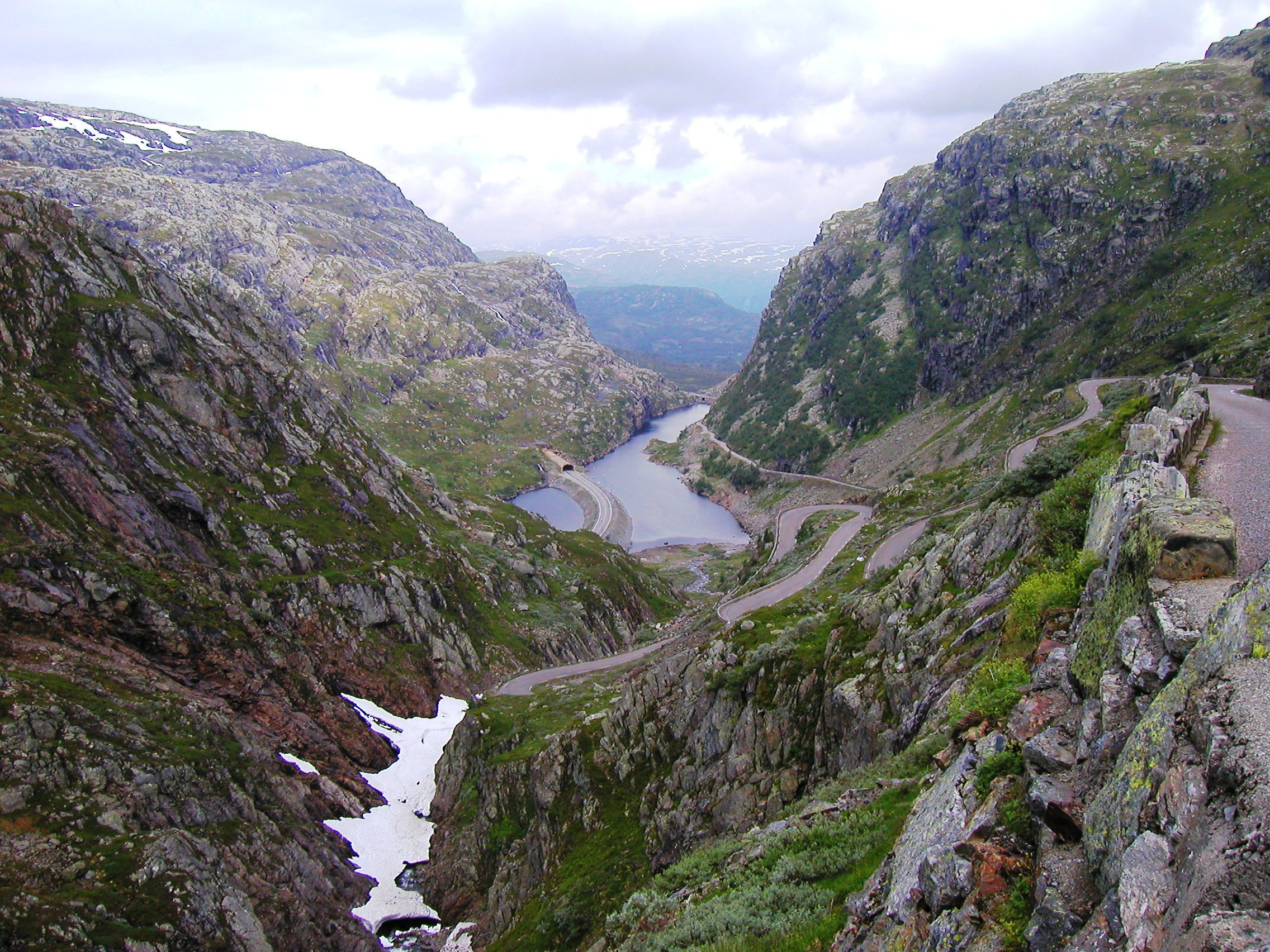 Description=De gamle Røldalssvingene